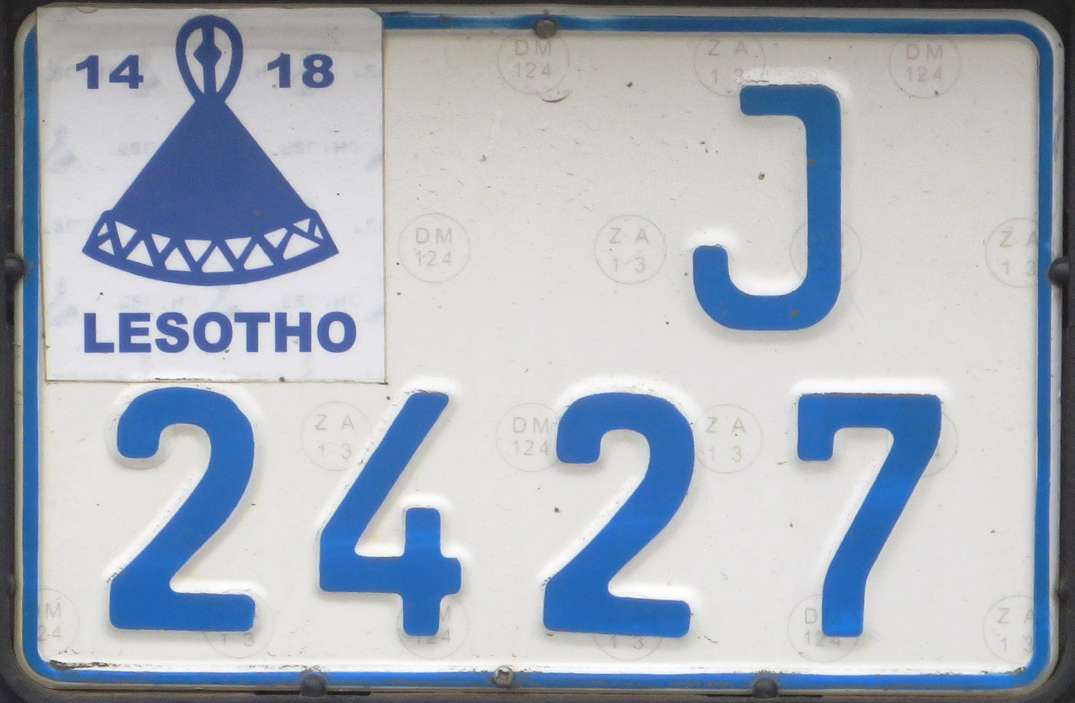 Lesotho kentekenplaat